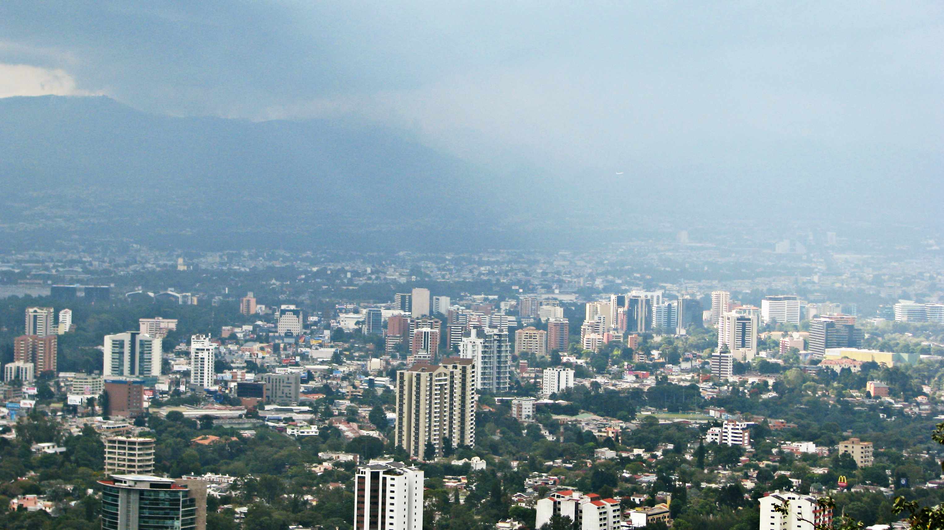 Panorama de Ciudad de Guatemala desde mirador.